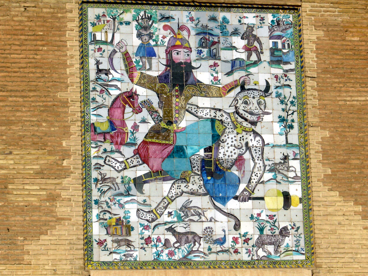 Mural, Karim Khan citadel. Qajar era.